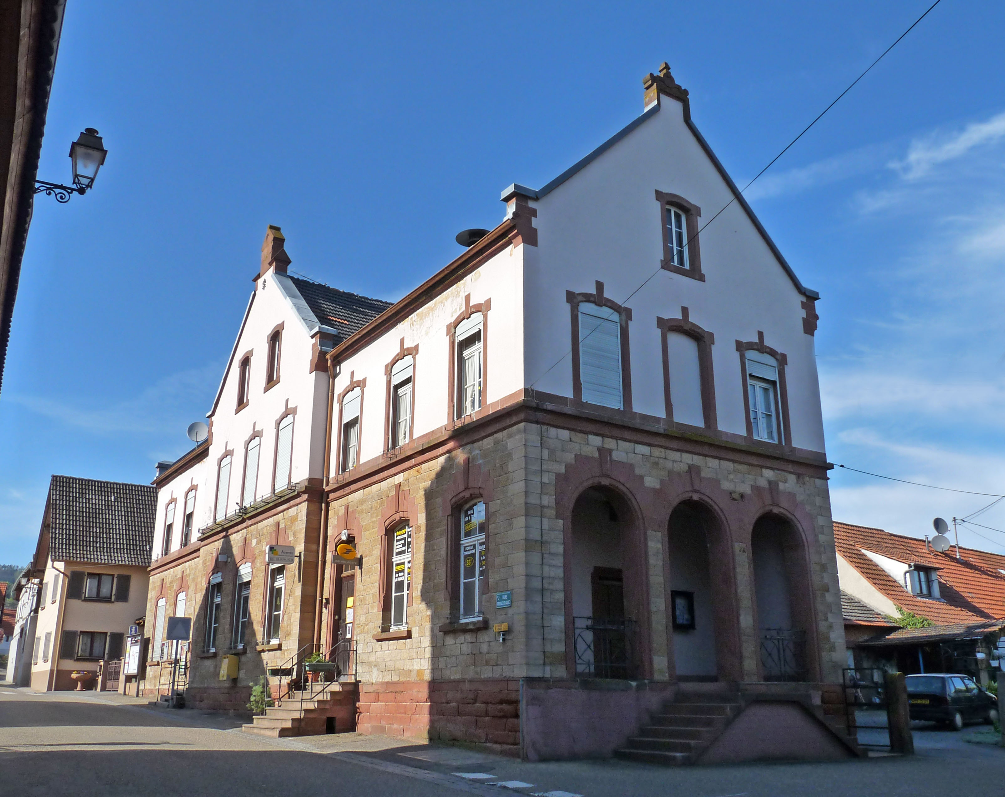 La Poste à Cleebourg (Bas-Rhin)